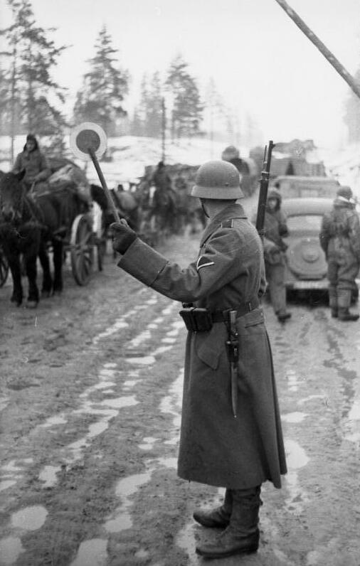 Scherl: Auf einer Verbindungsstraße zwischen Ilmensee und Finnischem Meerbusen Im Zuge der Frontverkürzung gehen Einheiten in planmäßiger Ordnung in die ihnen neu zugewiesenen Stellungen. Achtung! PK-Aufnahme Kriegsberichter Reimers 28.2.44 [Herausgabedatum] Zentralbild: II. Weltkrieg 1939-45 An der Front in der Sowjetunion. Ende Februar 1944. Bei der sowjetischen Offensive zur Befreiung des Leningrader Gebietes Januar-März 1944 räumen die deutschen Truppen das ganze Gebiet zwischen Ilmensee und Finnischem Meerbusen bis zum Peipus-See.